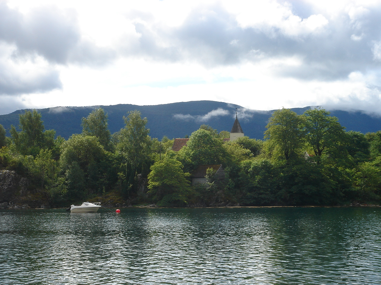 Kvamsøy kyrkje sett fra land, Kvamsøy kirke,Kvamsøy Church from the mainland